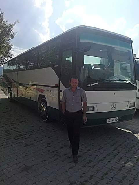 Kastamonu - Araç ilçesinde bir Mercedes-Benz O304